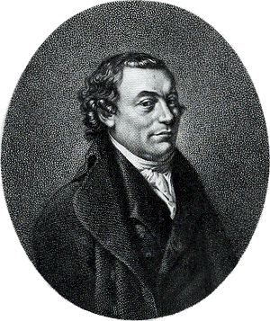 Gravure: De dichter Adriaan Loosje, 1761-1818, boekverkoper te Haarlem